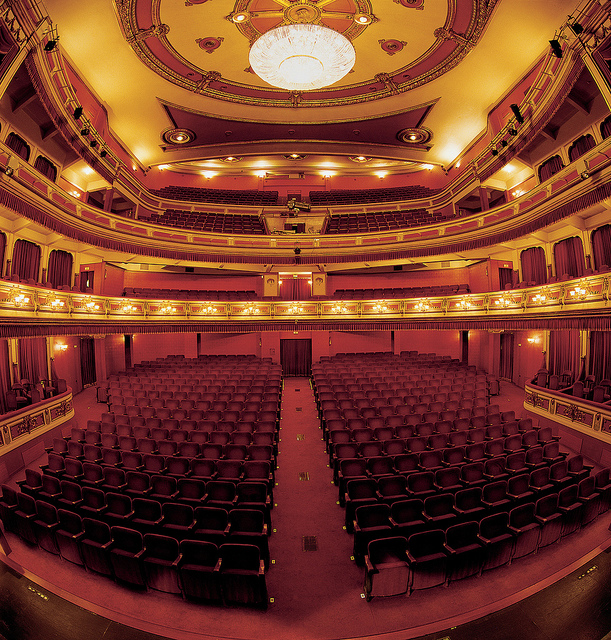 Vista del interior del teatro principal de Vitoria-Gasteiz